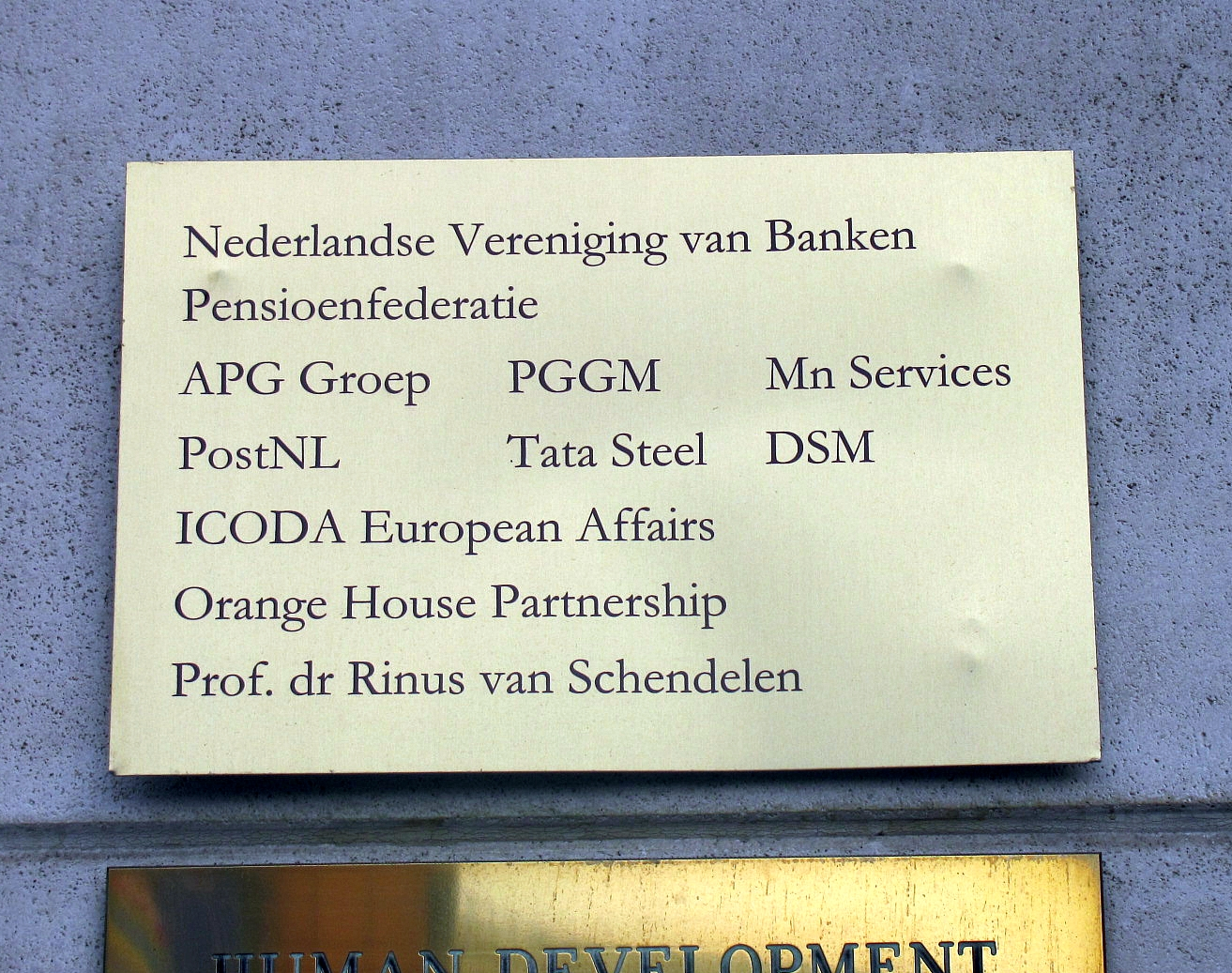 De top van een rij koperen naamplaten. Schumanplein: in het hart van de Brusselse lobbywereld waar ettelijke duizenden EU-lobbyisten opereren, delen Nederlandse bedrijven, ideële organisaties, pensioenverzekeraars, distributeurs, consultants en bankenorganisatie een kantoor.